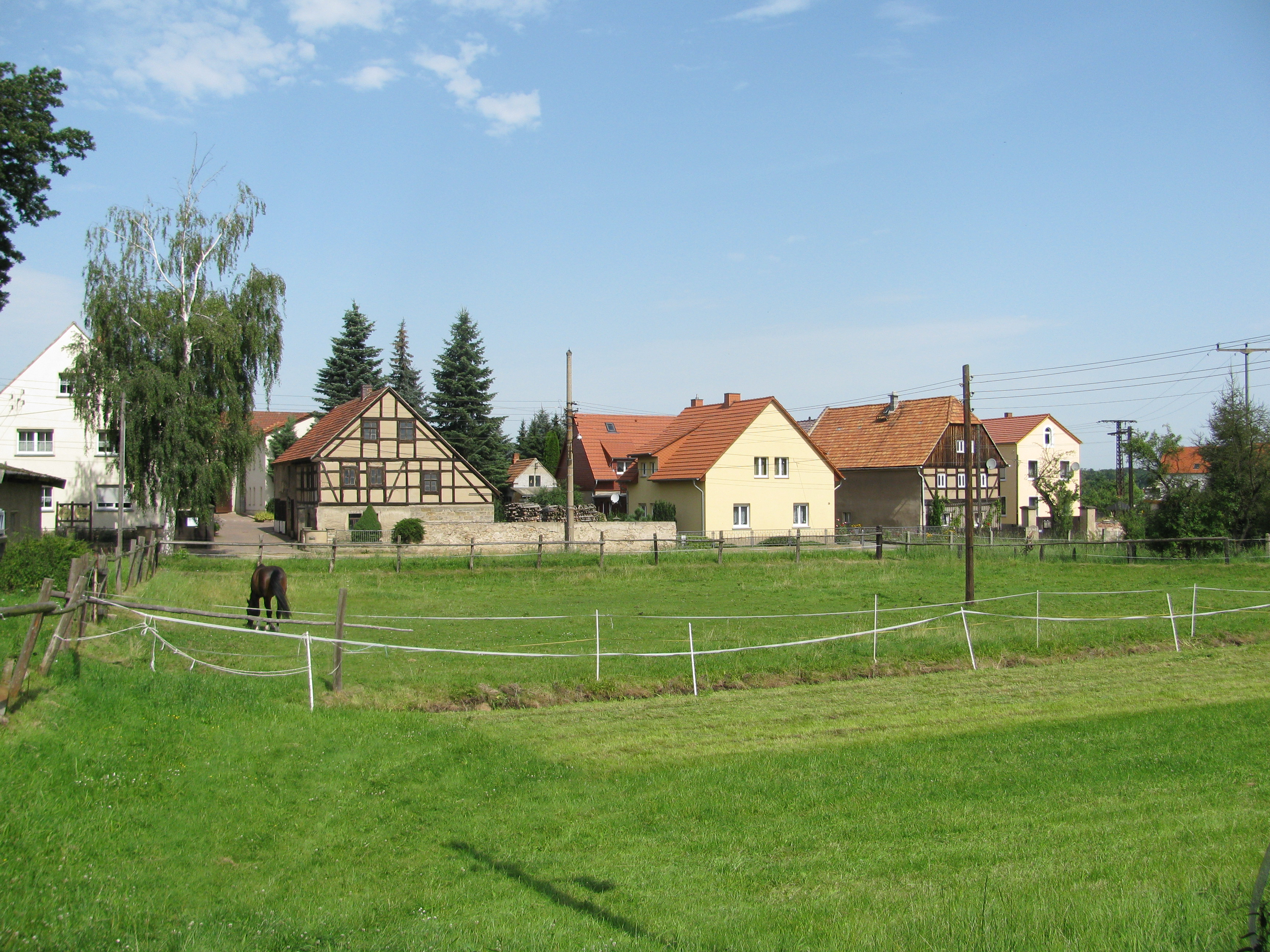 Häuser im Dorfkern des früheren Marktfleckens Eisenberg, Gemeinde Moritzburg, Sachsen